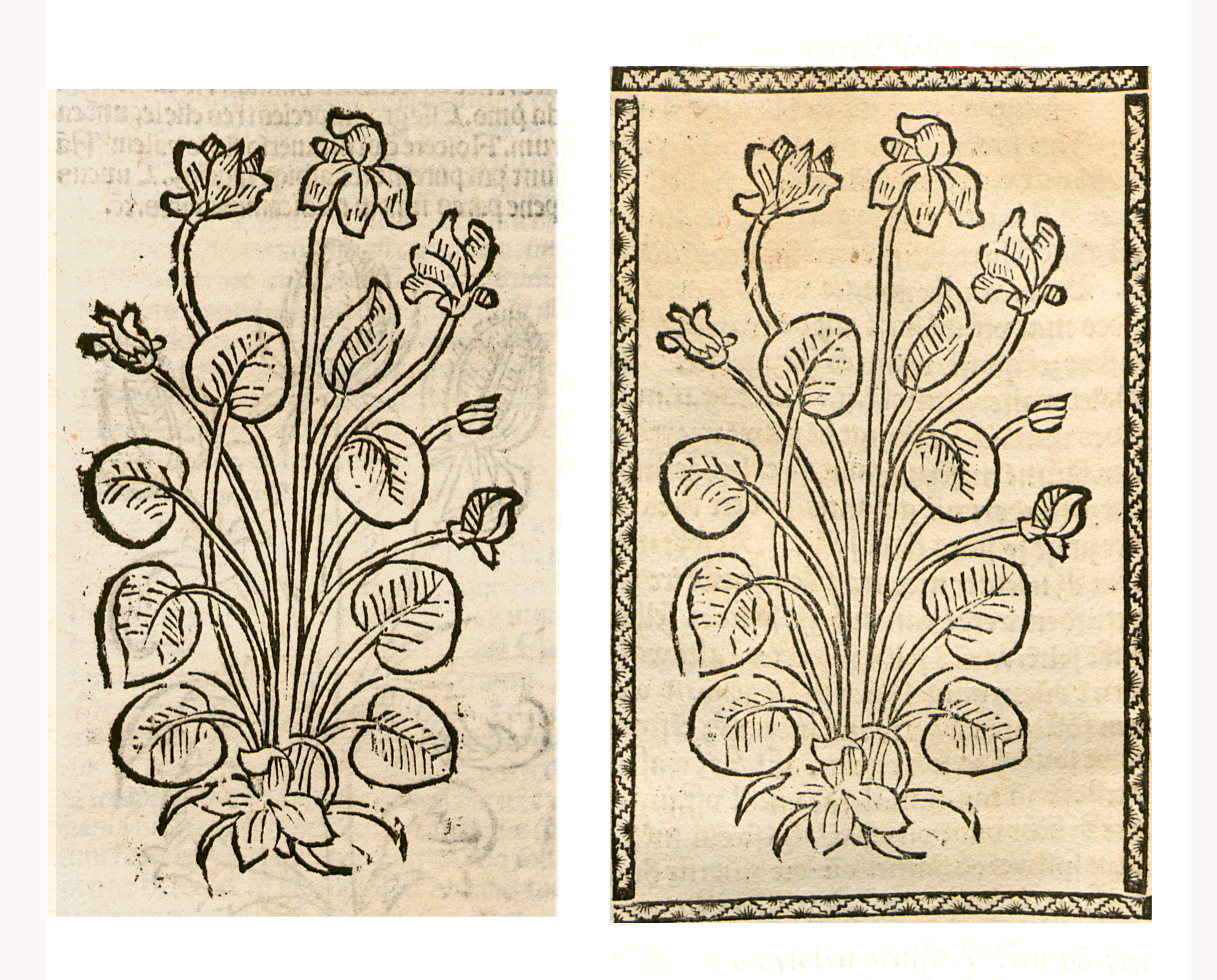 Abbildung von: Blaue Veilchen